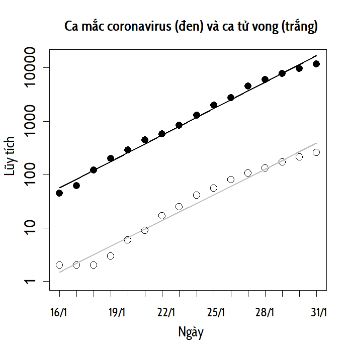 Biểu đồ dạng bán logarit